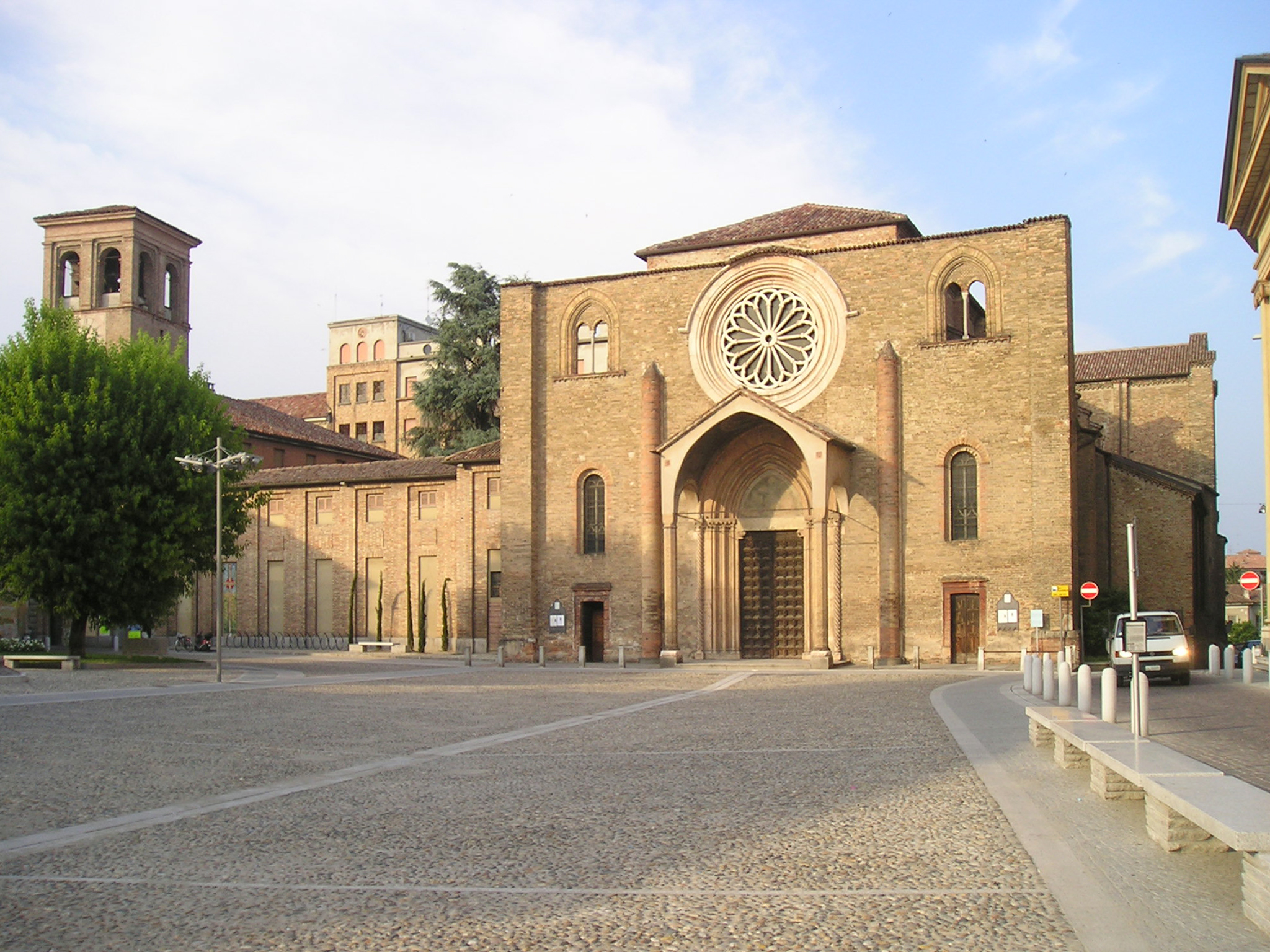 Vista di piazza Ospitale a Lodi